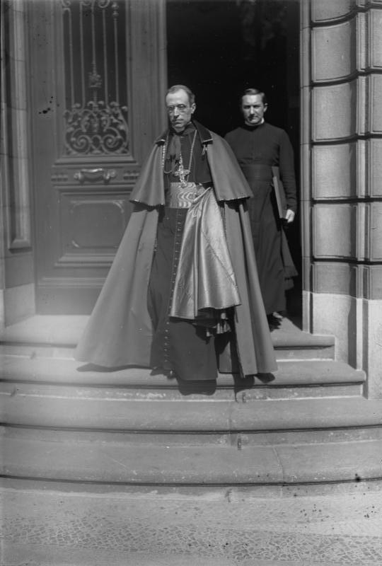 Der feierliche Austausch der Ratifikations-Urkunden des Konkordats zwischen dem preussischen Ministerpräsidenten Braun und dem päpstlichen Nuntius Pacelli! fand unter Anwesenheit sämtlicher preussischer Staatsminister im Preussischen Staatsministerium in Berlin, Wilhelmstrasse statt. Der päpstliche Nuntius Pacelli verlässt nach dem feierlichen Austausch der Ratifikations-Urkunden des Konkordats das Preussische Staatsministerium in der Wilhelmstr.